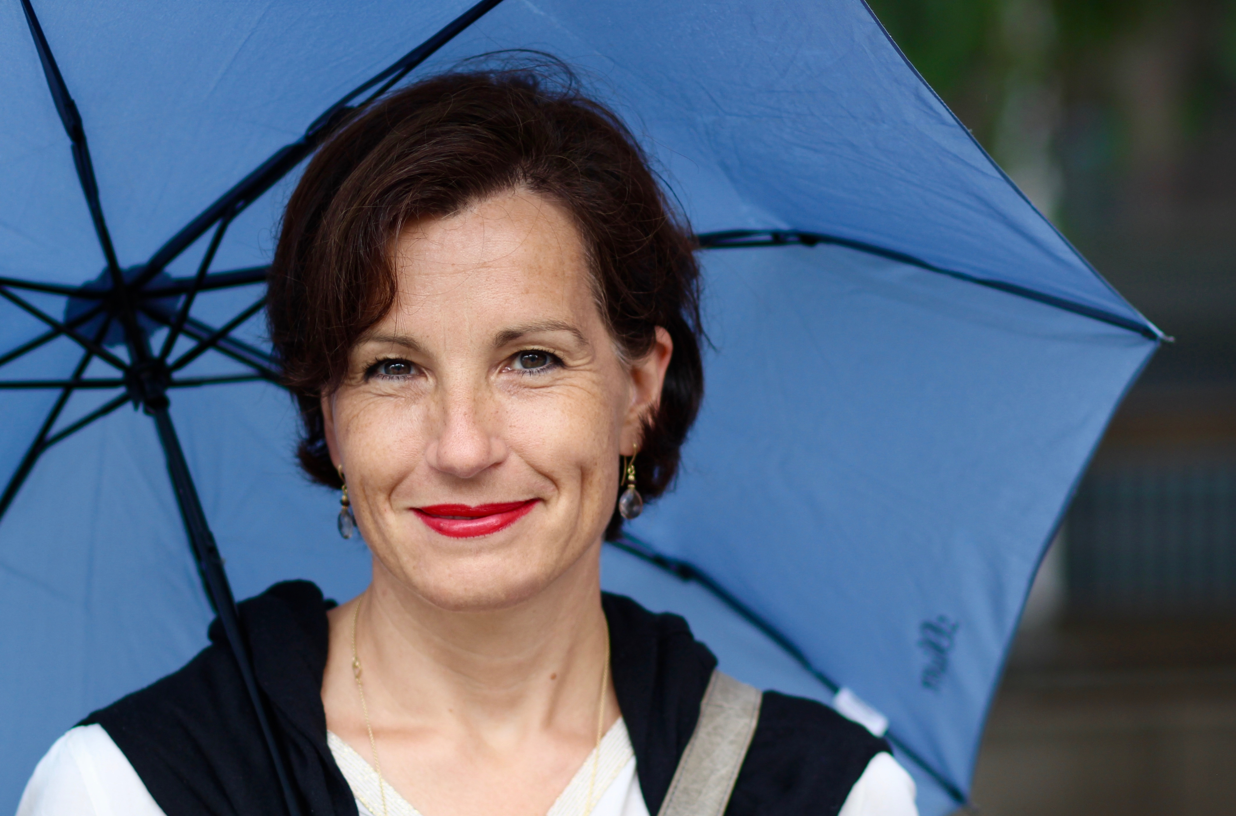 Sopranistin Miriam Meyer, private Aufnahme